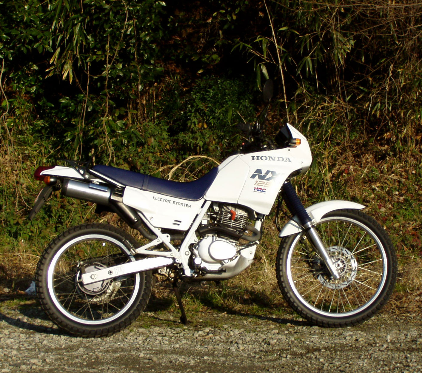 Honda NX125